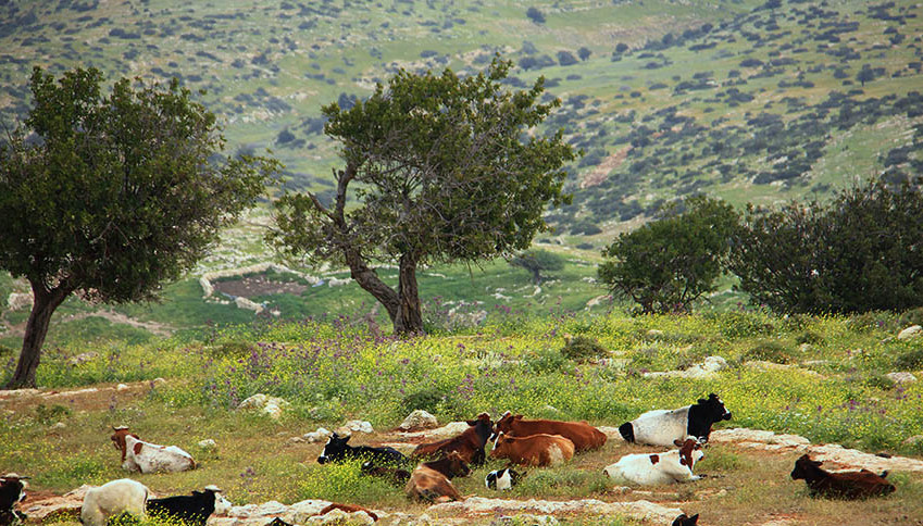 سهل البقيعه طوباس حيث أن البقيعة مجموعة قروية فلسطينية في محافظة طوباس شمال الضفة الغربية، تضم ثلاث قرى صغيرة هي خربة عاطوف، الحديدية وخربة حمصة.